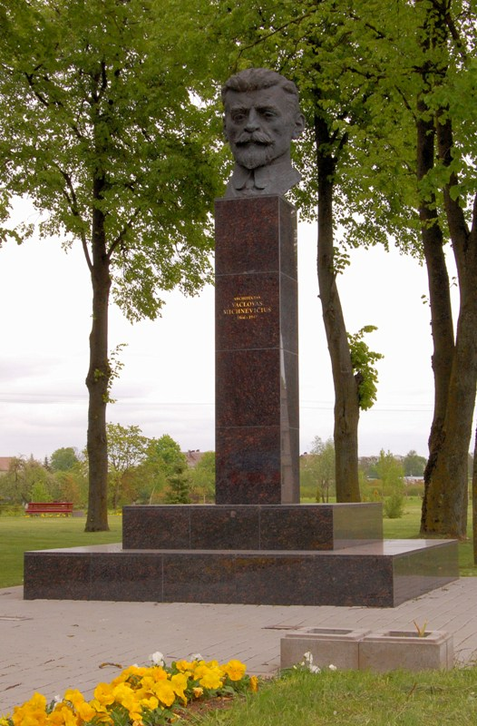 Paminklas Vaclovui Michnevičiui.